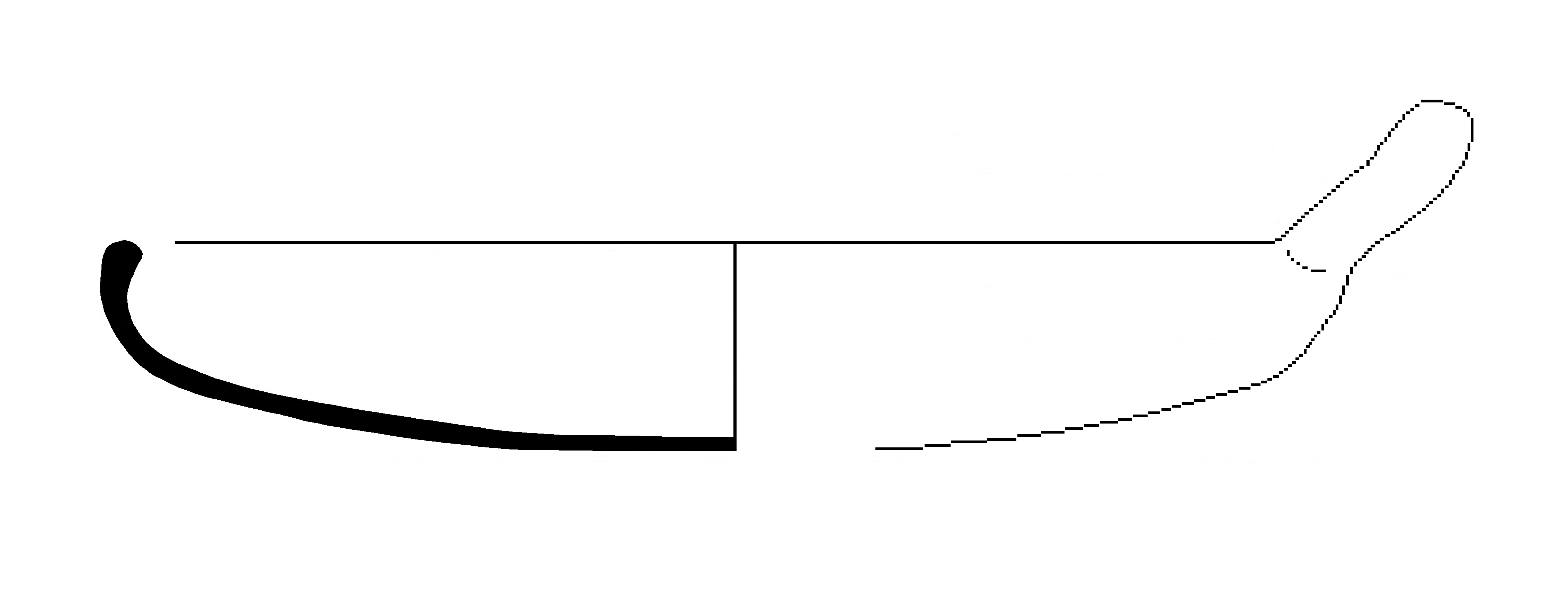 Typ of teganon with flat bottom or slightly concave